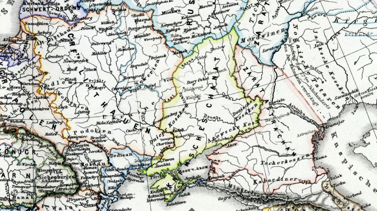 Osteuropa und das Krimnkhanat, politische Situation um das Jahr 1550